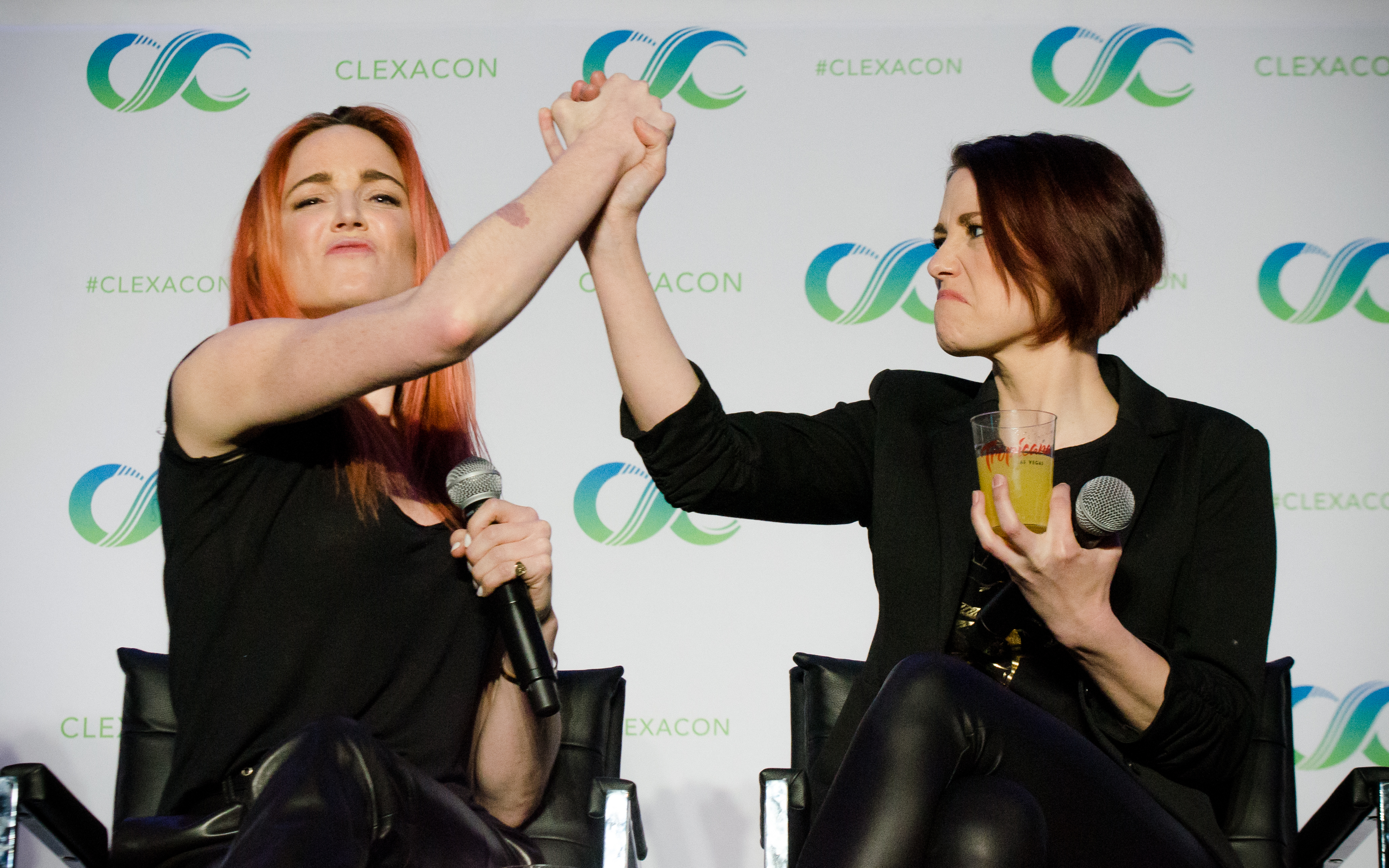 Caity & Chyler [1]